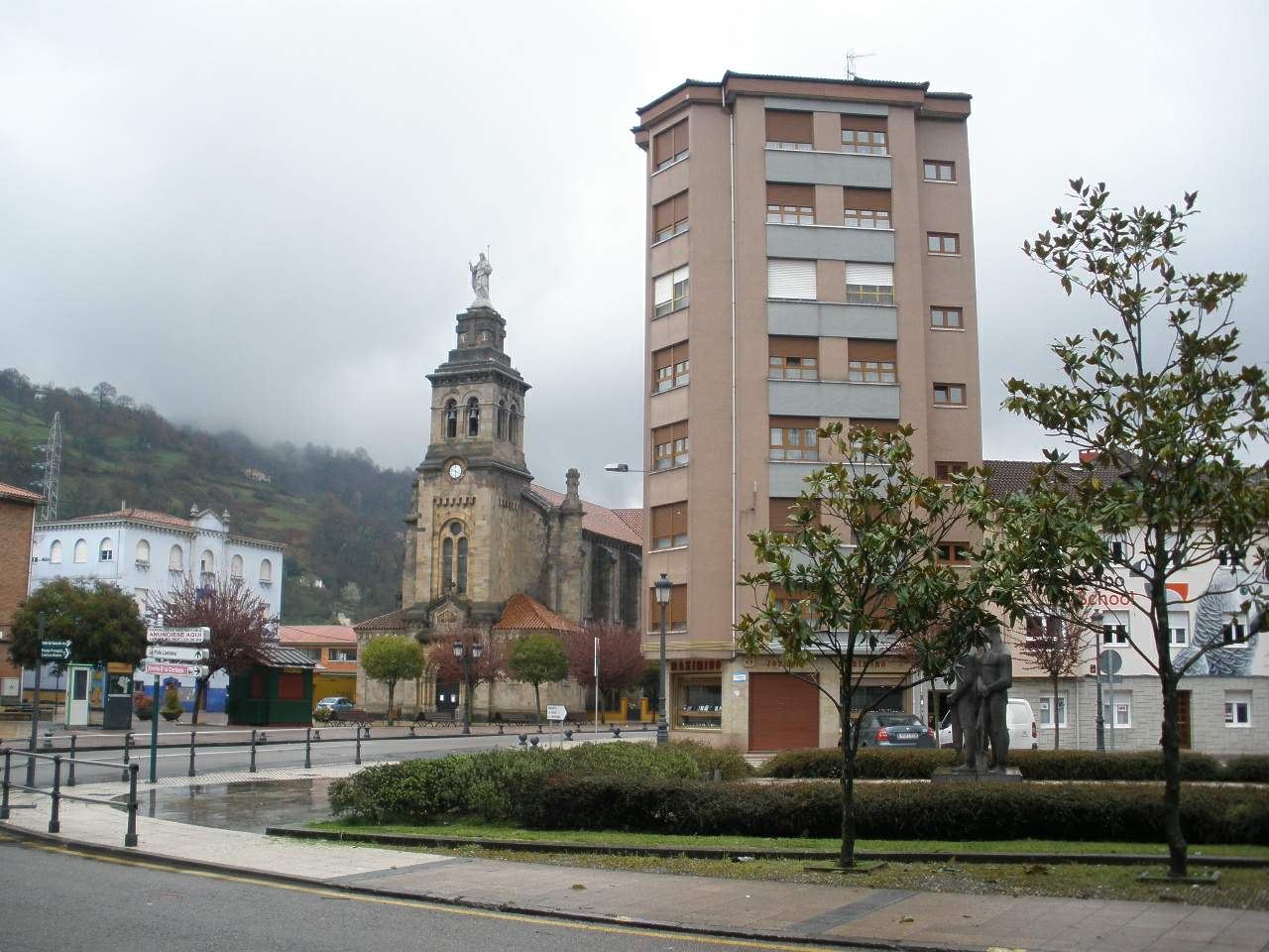 Ciaño (Langreo)